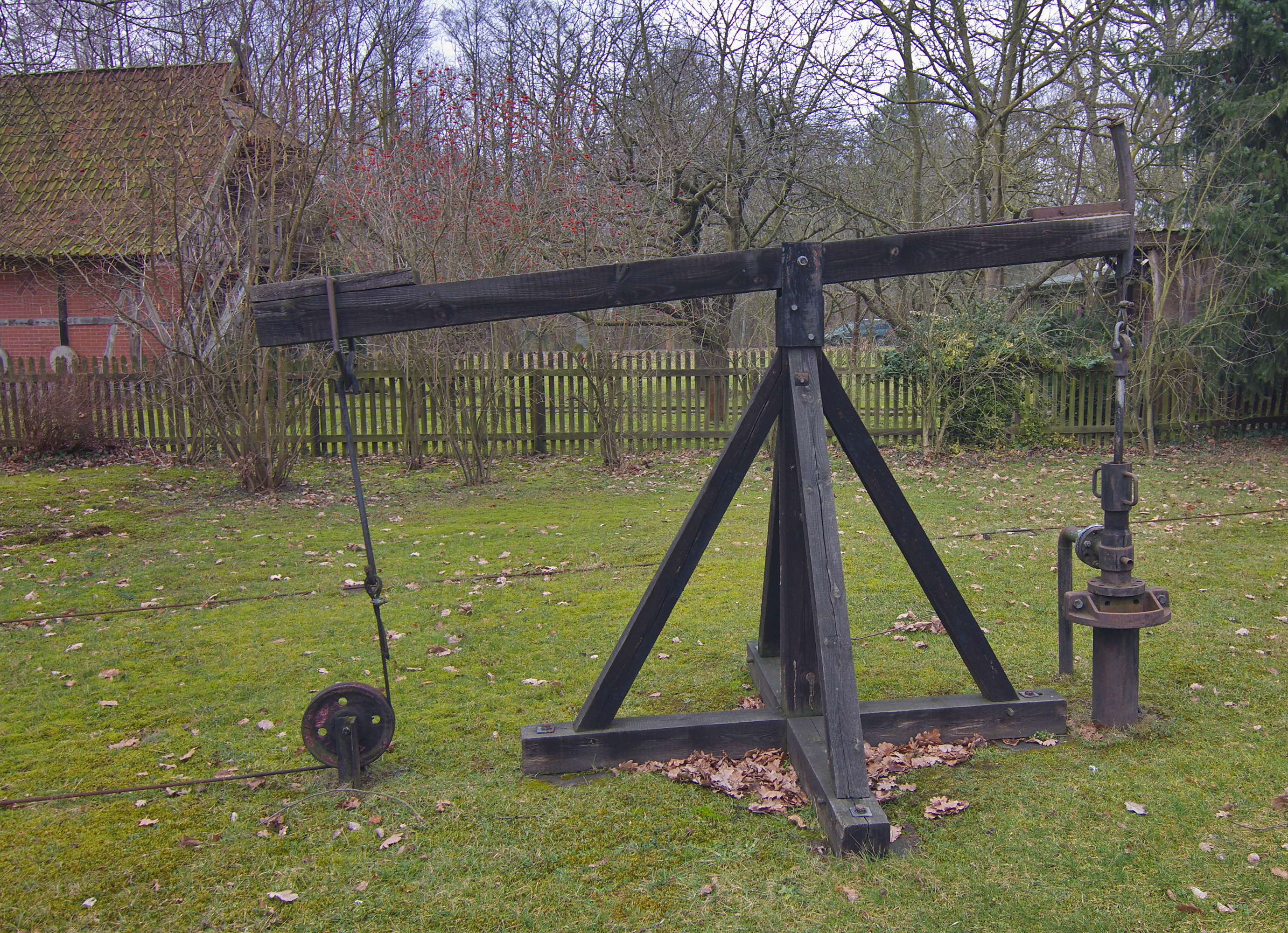 Das Deutsche Erdölmuseum Wietze befindet sich in Wietze, es wurde auf einem Teil des ehemaligen Erdölfeldes Wietze eingerichtet und 1970 eröffnet.